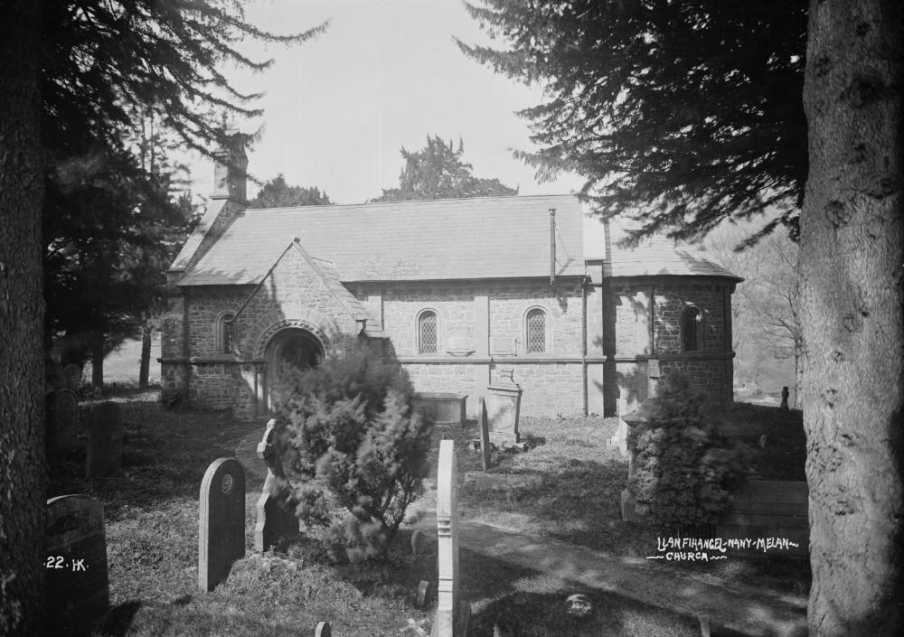 Abstract: Llanfihangel-Nant-Melan church